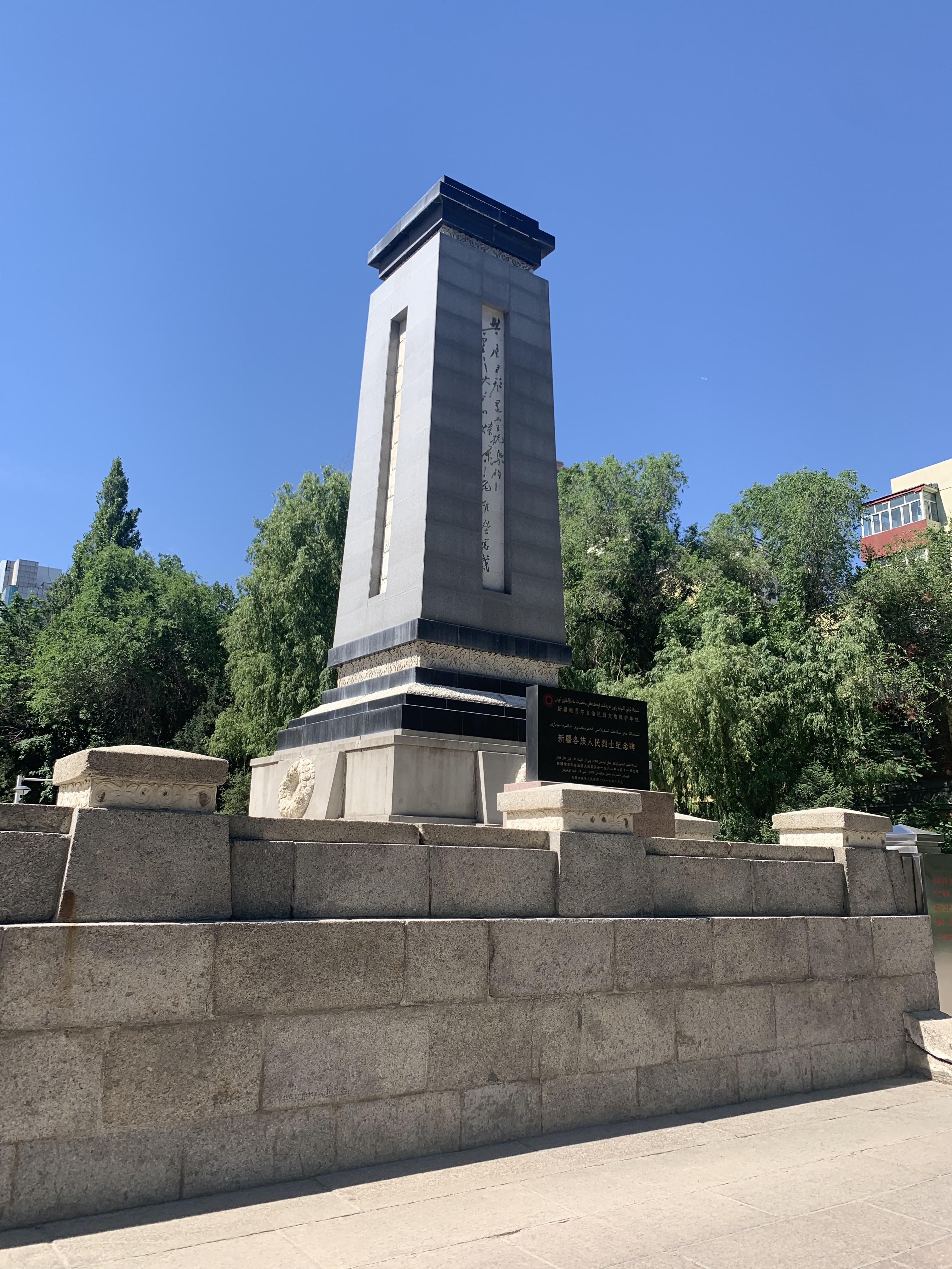 新疆各族人民烈士纪念碑2